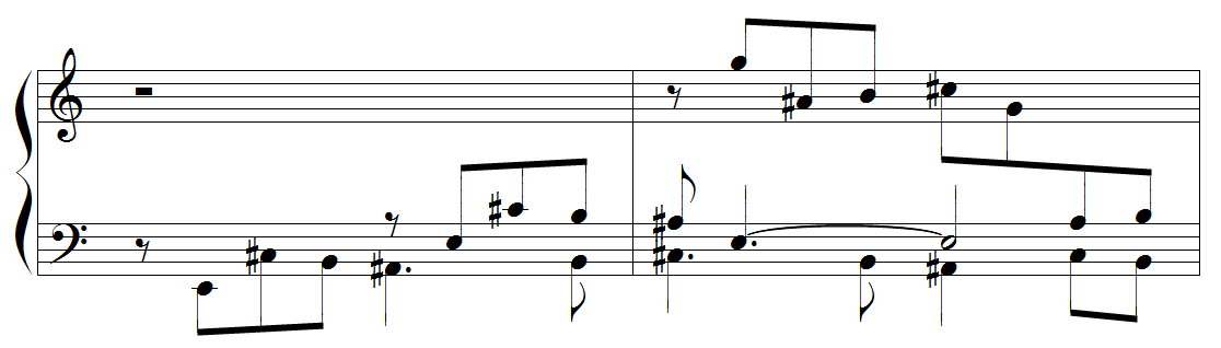 Anton Reicha - second sujet de la fugue n°18 des 36 fugues, op.36